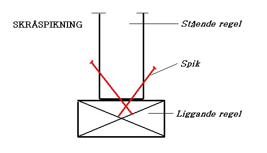 Illustration för skråspikning